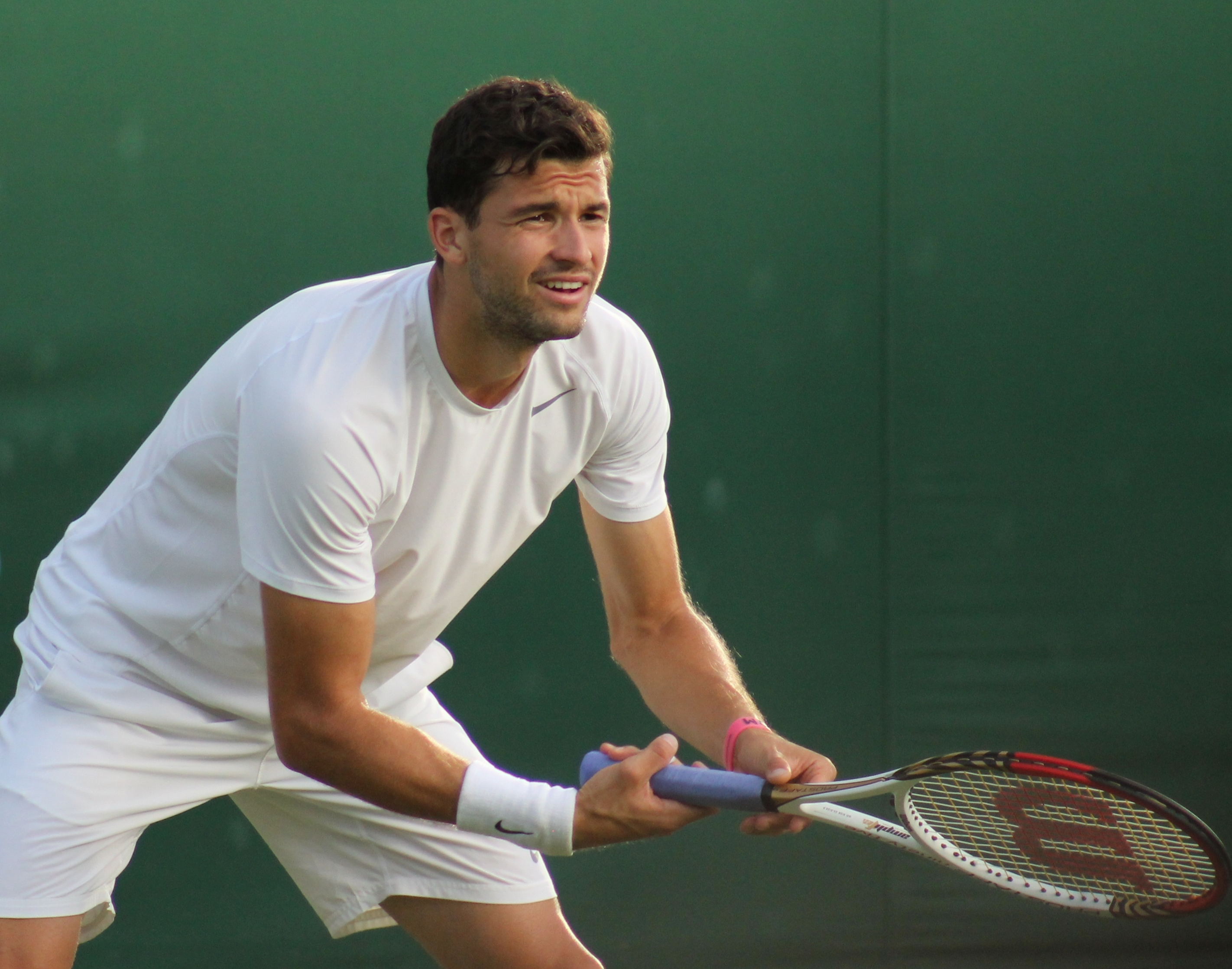 Dimitrov WM13-021